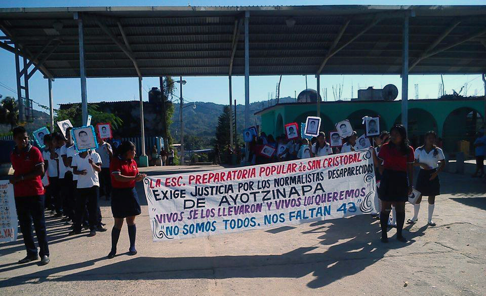 Preparatoria Popular de la comunidad de San Cristobal, Tlacoachistlahuaca, Gro.